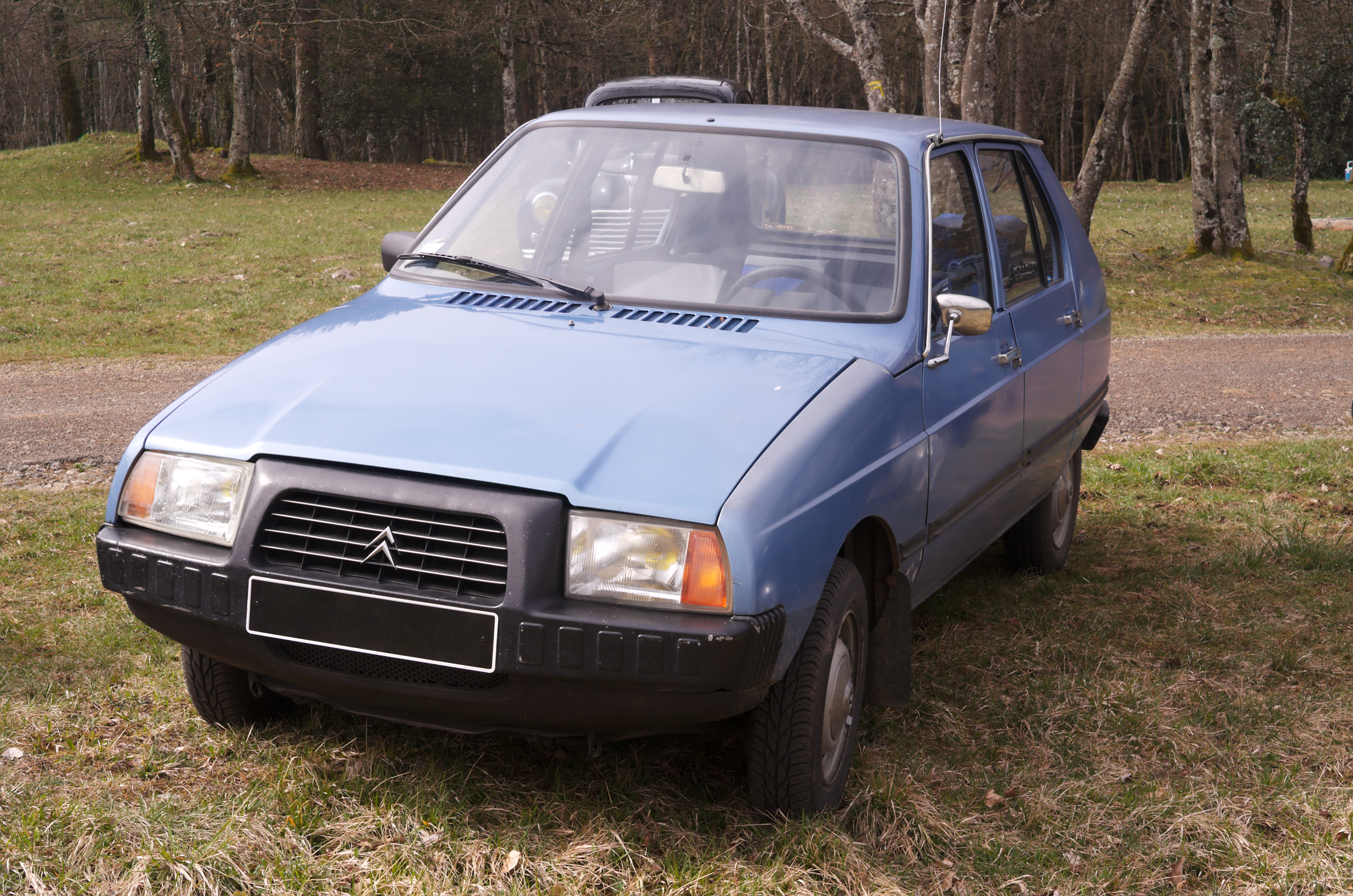 Sortie Soupapes dégrippées 07-04-2013 - Citroen Visa